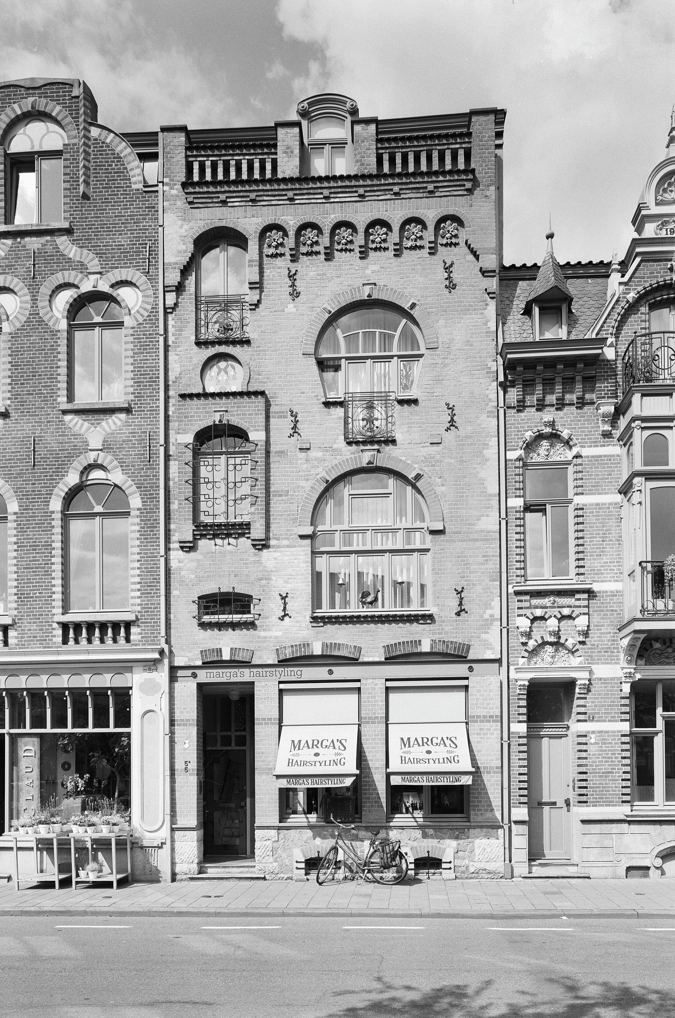 Overzicht voorgevel